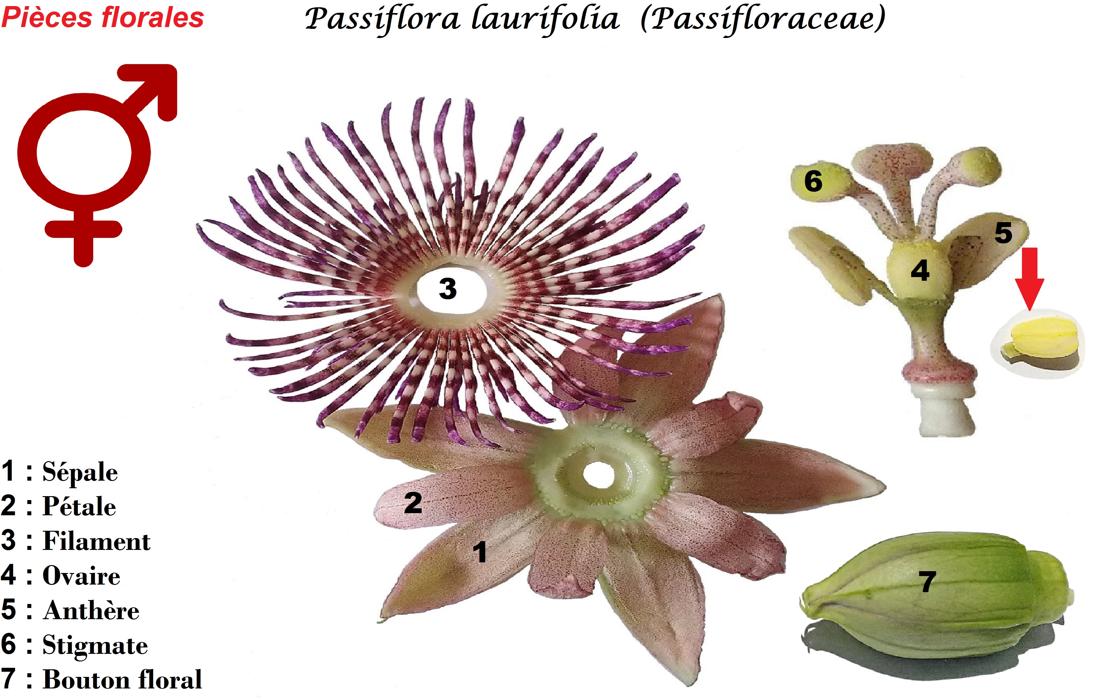 Pièces florales de Passiflora laurifolia de la famille des Passifloraceae